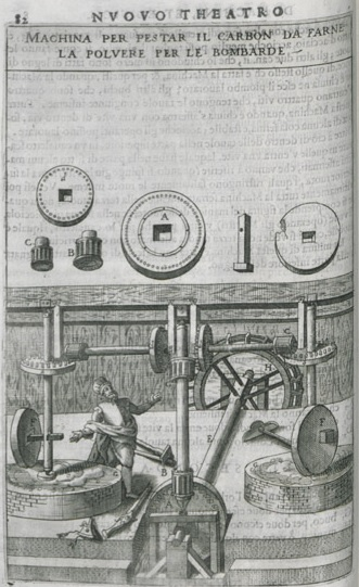 Bomba tratto da Novo teatro di machine et edificii